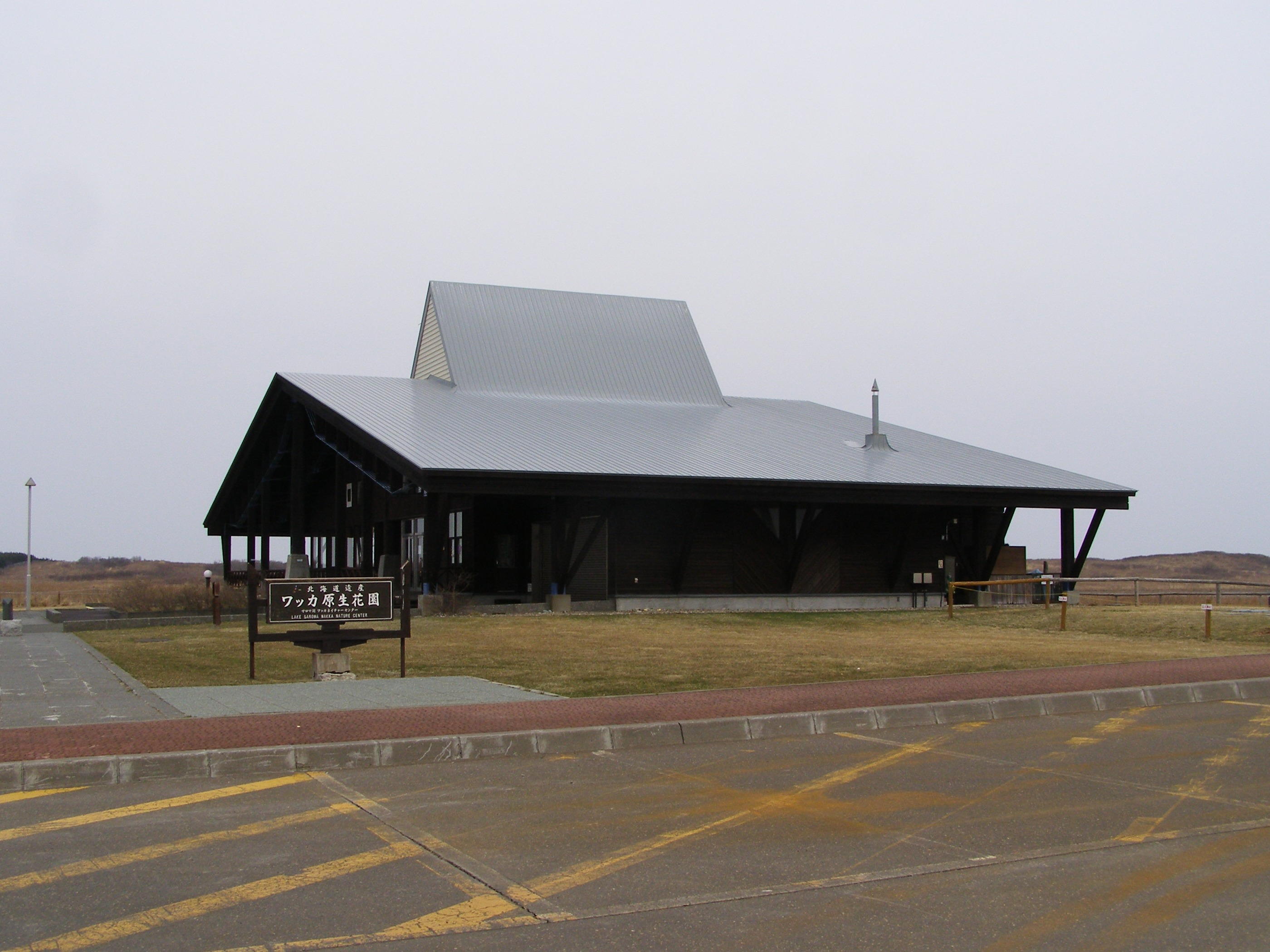 ワッカ原生花園ワッカネイチャーセンター